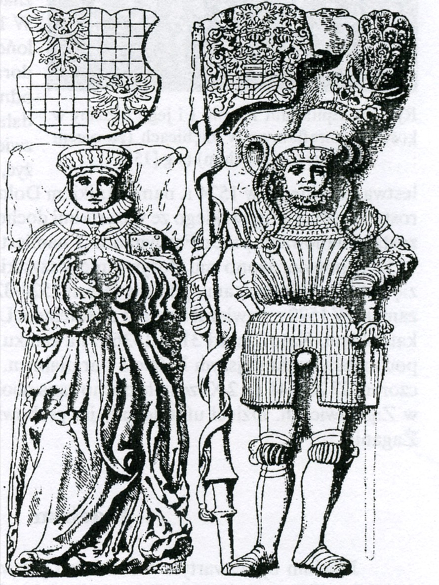 Nagrobek Karola I Podiebradowicza i Anny żagańskiej